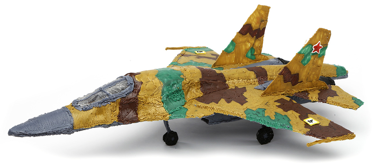 Поделка, созданная «горячей» 3D ручкой Feizerg F001.